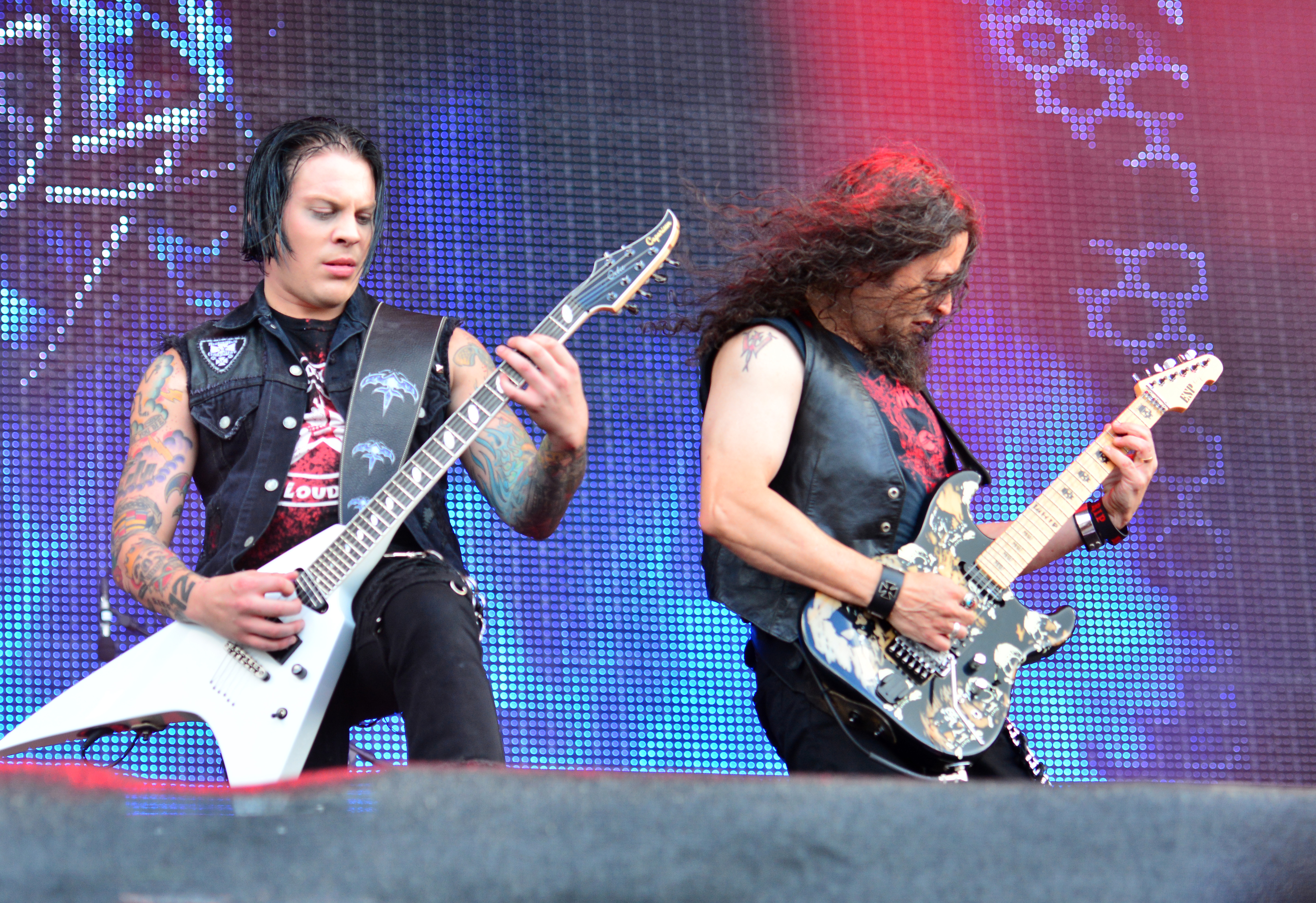 Queensryche bein Wacken Open Air 2015